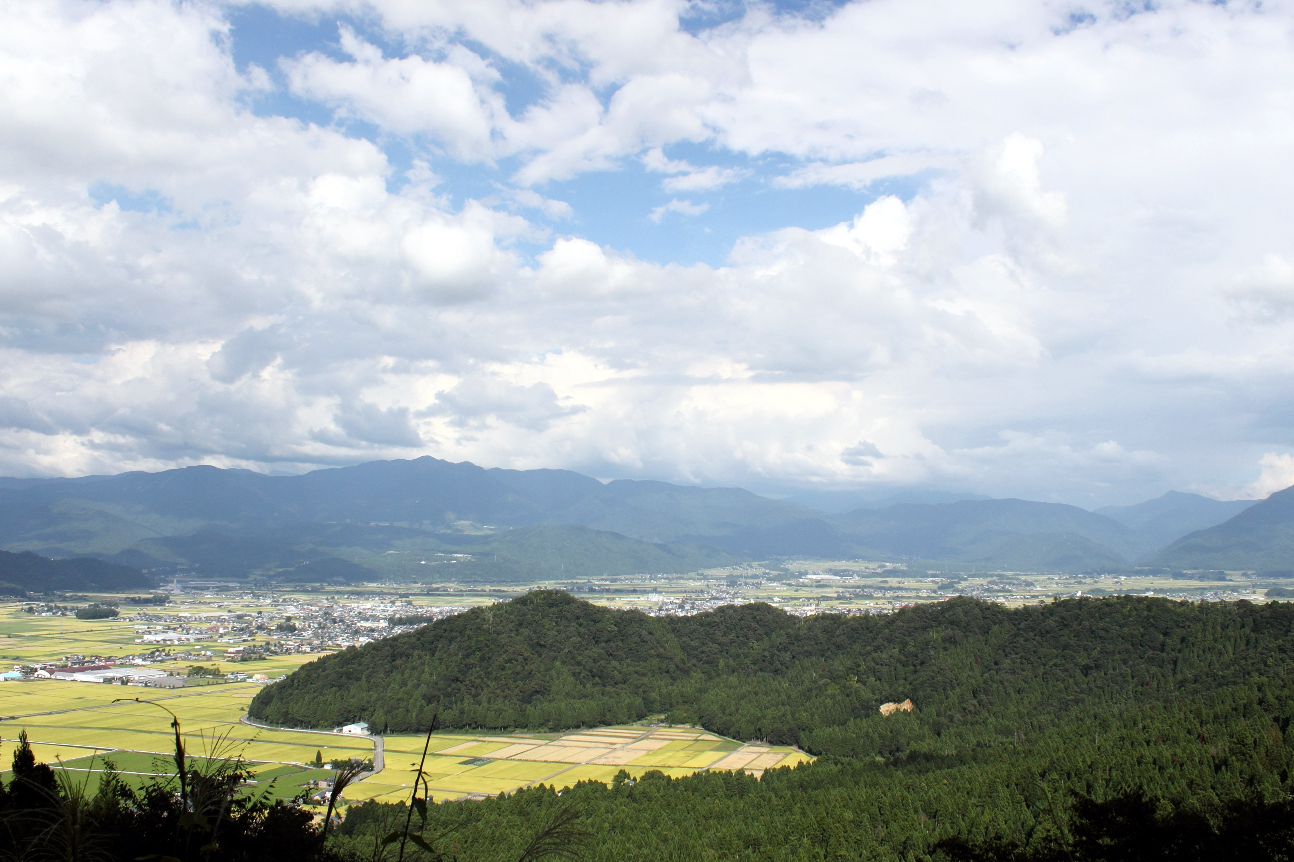 丁坂より望む大野盆地風景